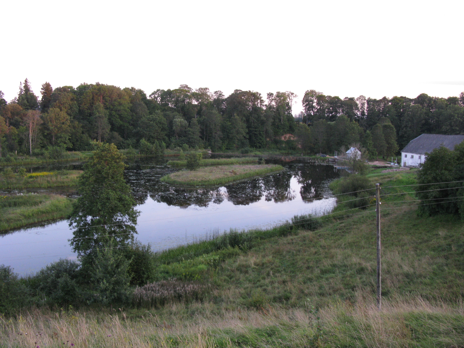 Vaade lõunaküljelt veskipaisu poole.